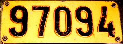 Skilt til militære kjøretøy.